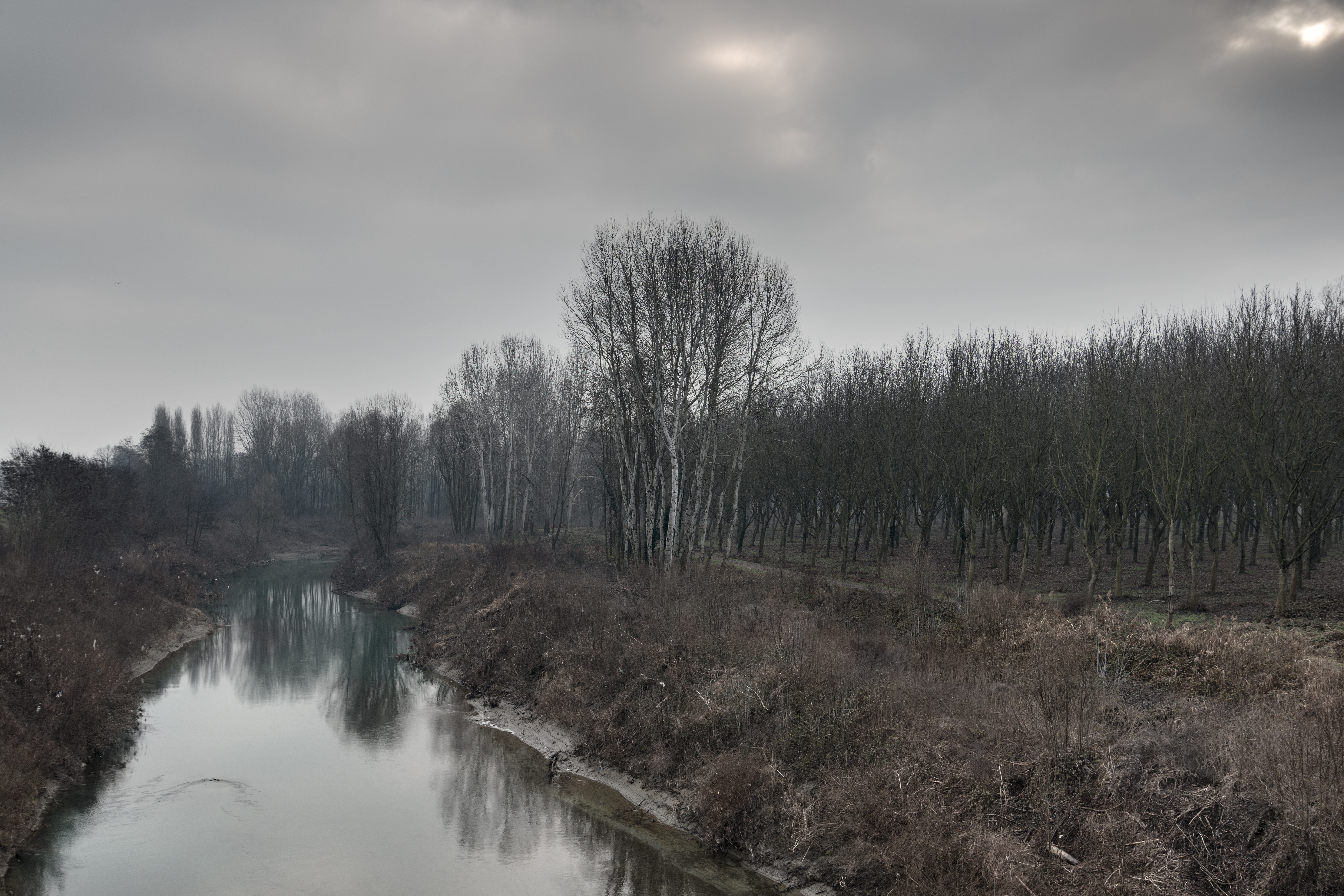 Fiume Panaro - Ponte Sant'Ambrogio, San Cesario sul Panaro, Modena, Italia